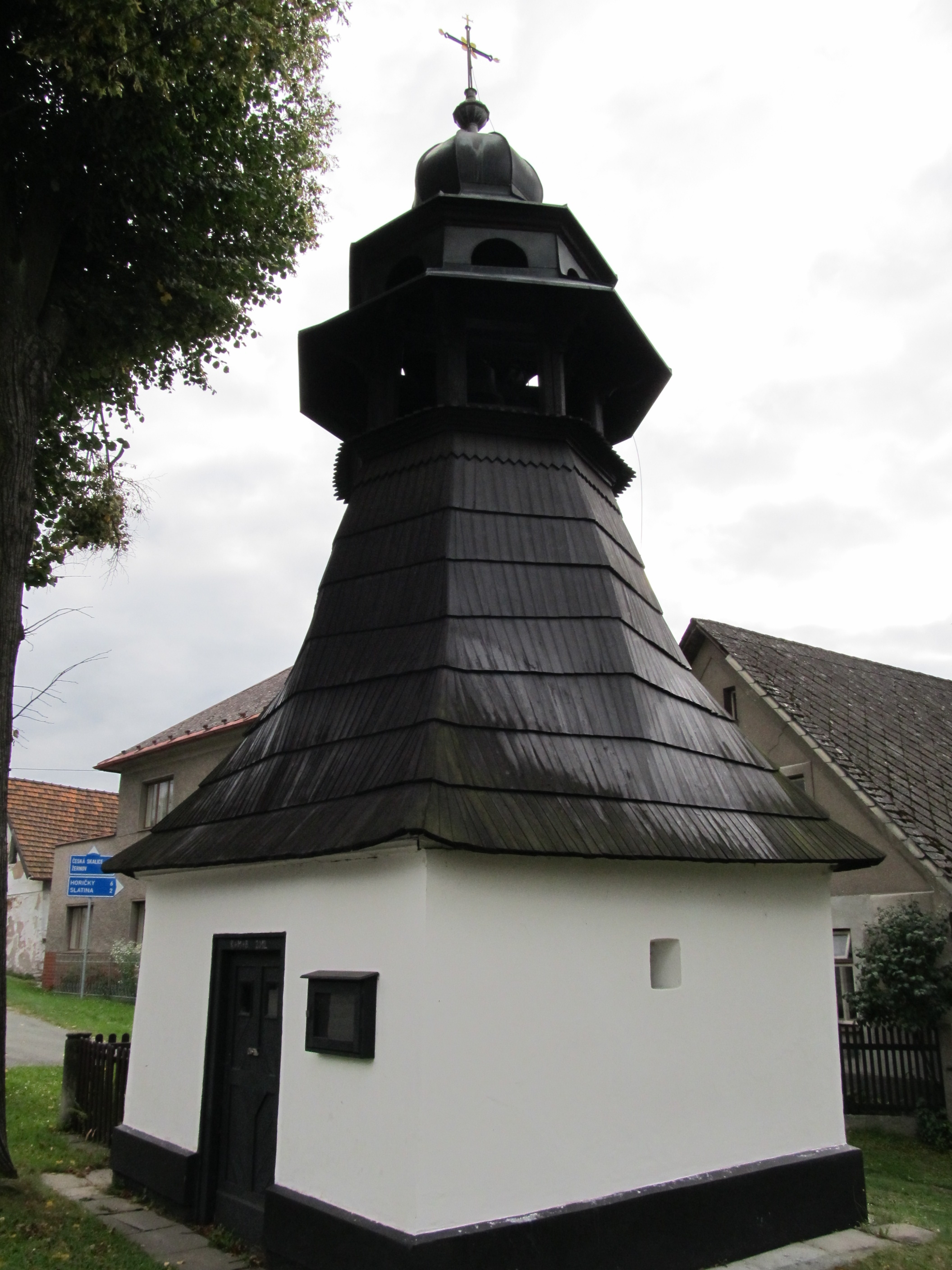 Kaplička Panny Marie se zvonicí (Červená Hora), Červená Hora